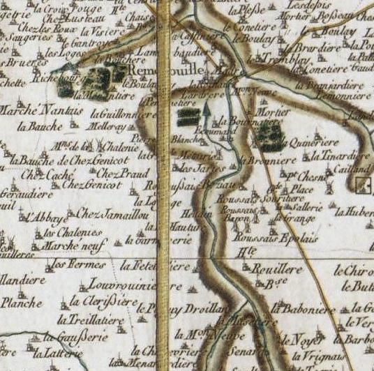 Partie de la carte générale de la France. [Nantes]. N°131. Feuille 168 centrée sur Remouillé